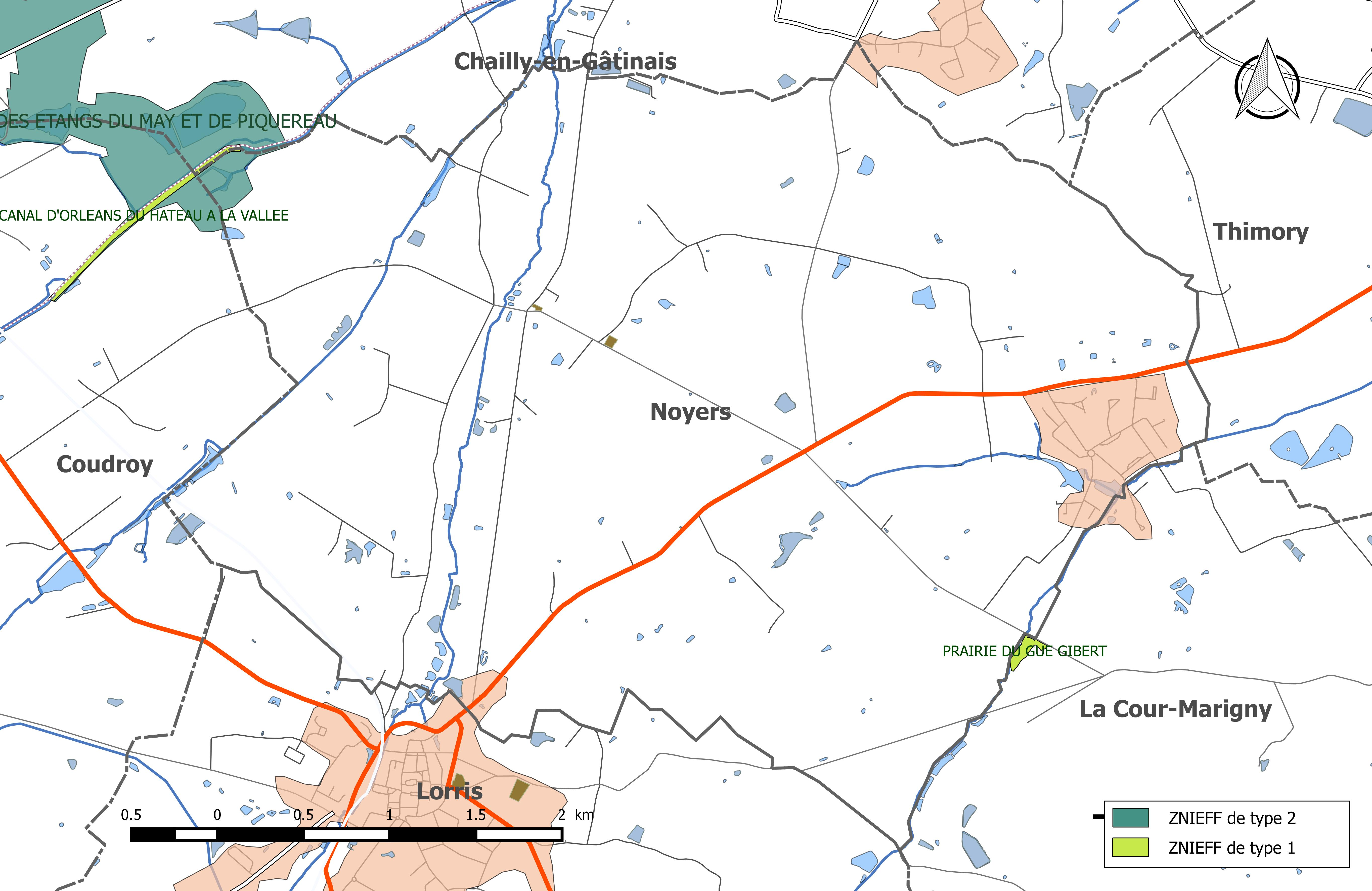 Carte des Zones naturelles d'intérêt écologique faunistique et Floristique (ZNIEFF) de la commune de Noyers (Loiret).